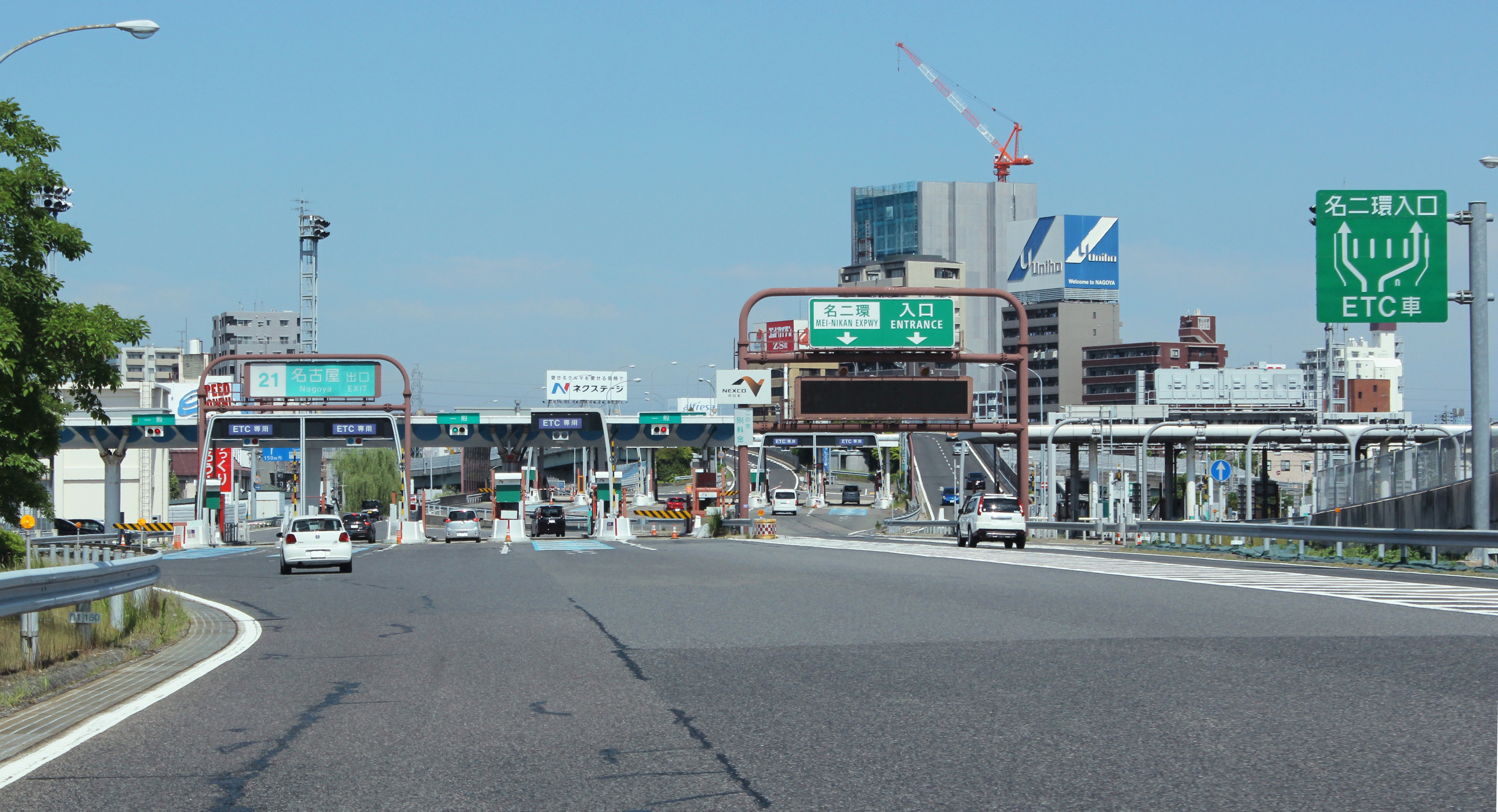 東名高速道路 名古屋IC